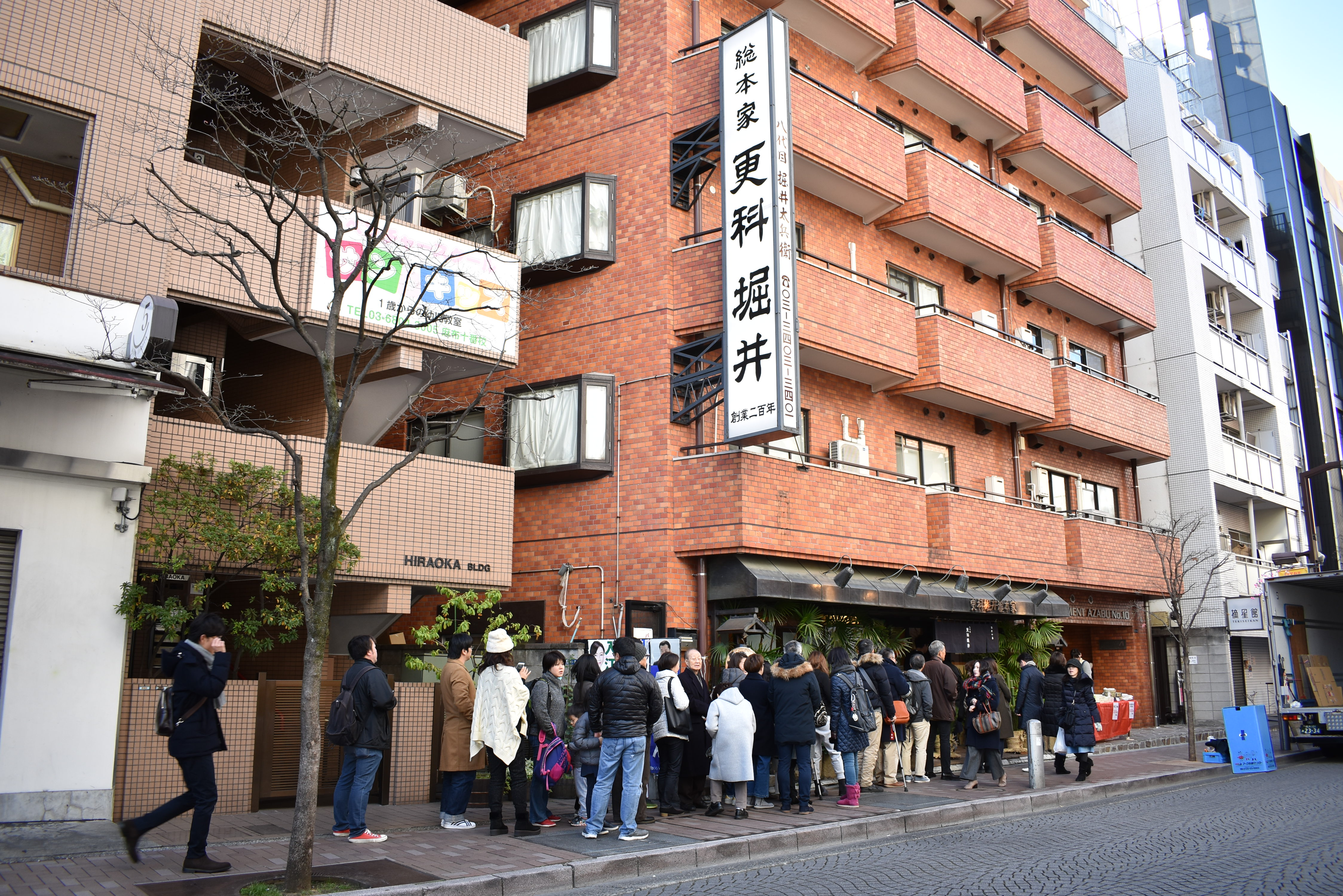 麻布十番 更科堀井